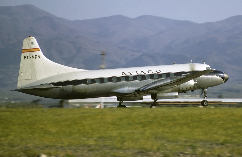 EC-APV (cn 330) Taken during my first visit to Spain when I was just 15. Stayed in a villa a short walk from the boundary fence and would be woken by the sound of the early morning Convair starting up for the service to Madrid. Still one of my all-time fave shots